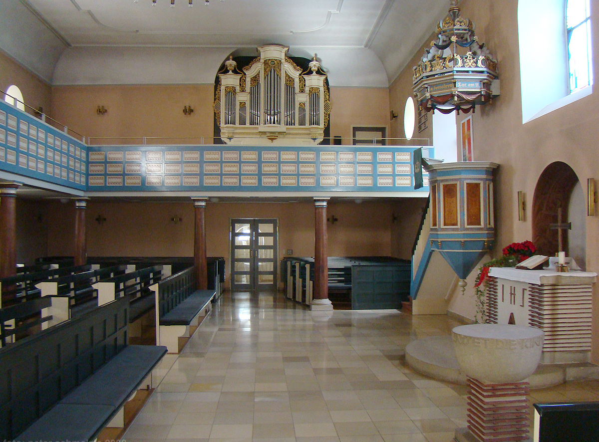 Innenraum der St.-Blasius-Kirche in Ostfildern-Nellingen